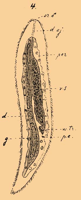 Иллюстрация к статье Эхиуровые из энциклопедии Брокгауза и Ефрона